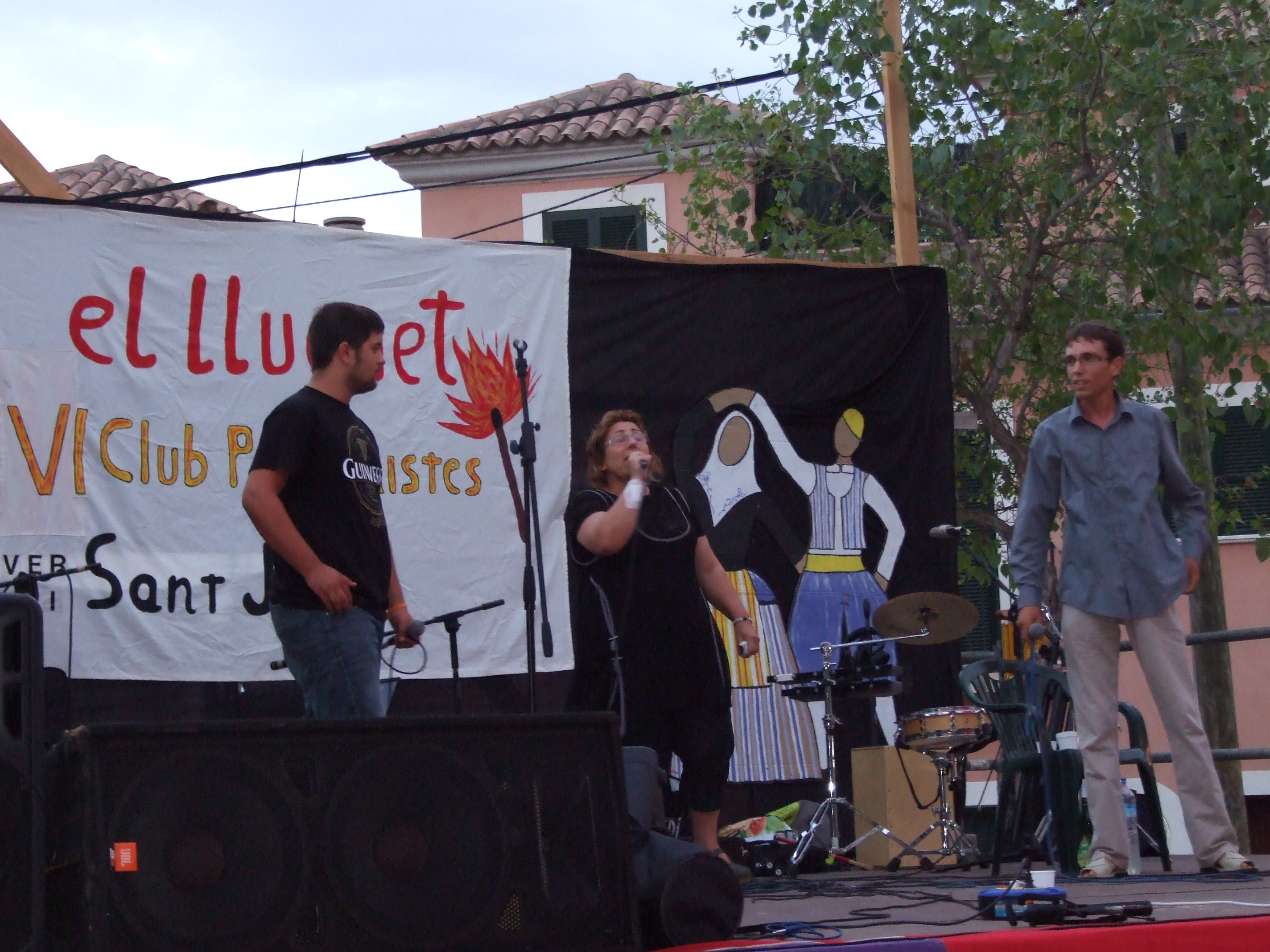 Glosadors a Sant Jordi (Palma de Mallorca).